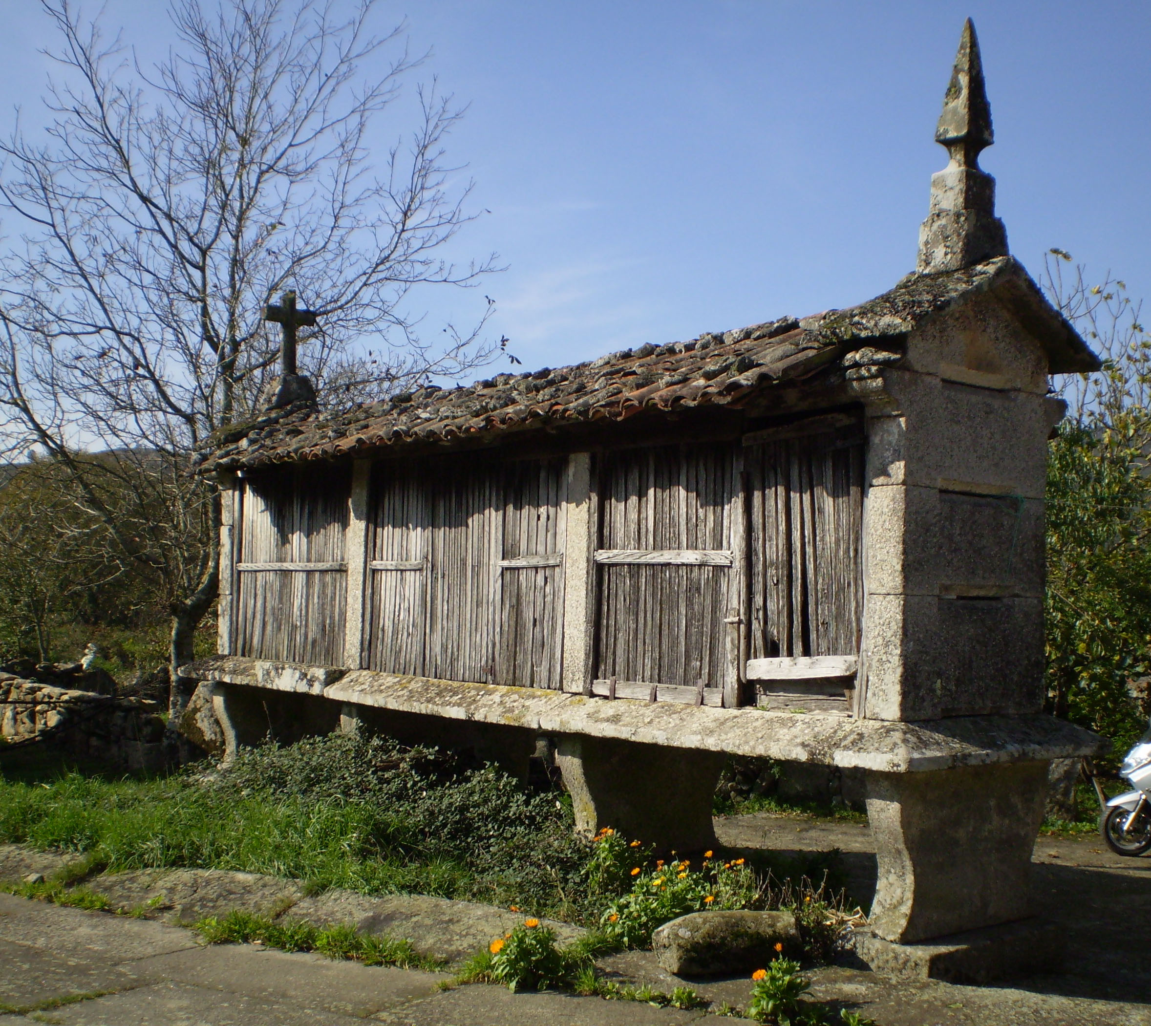 Hórreo de tres claros, tipo mahía, no lugar de Fonfría (Antas de Ulla)